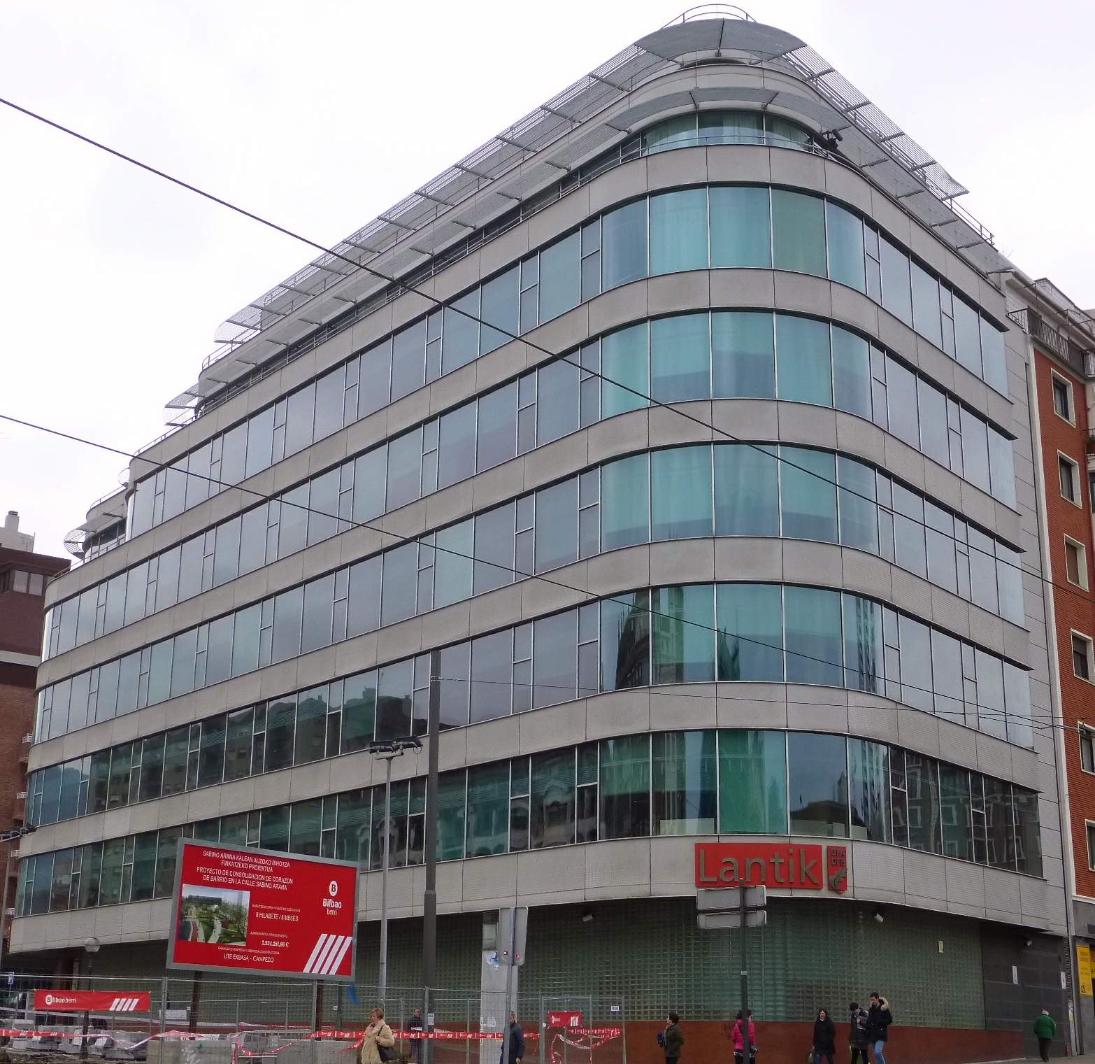 Bilbao - Edificio Lantik (BFA/DFB)